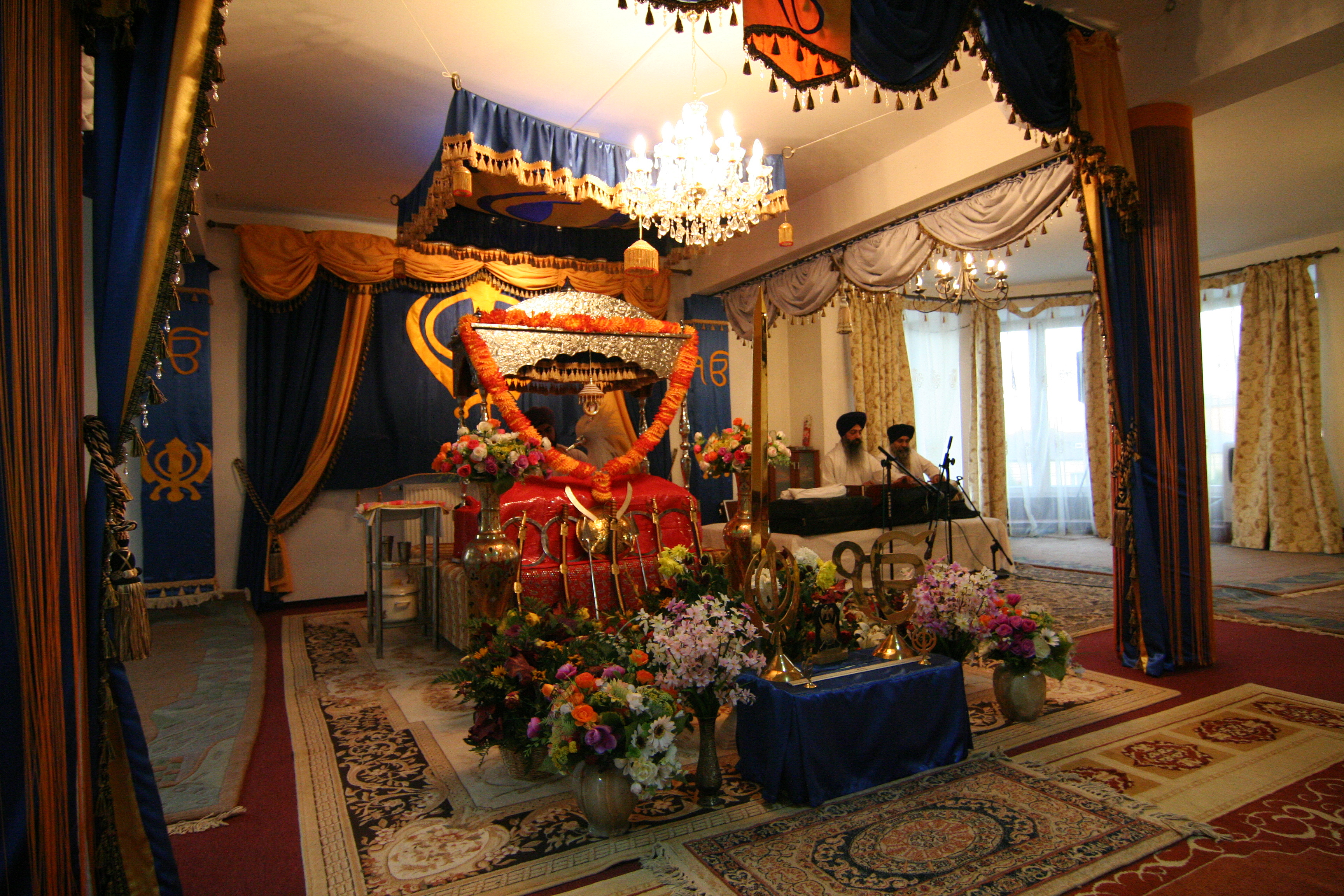 Singh Saba Gurudwara in Poland